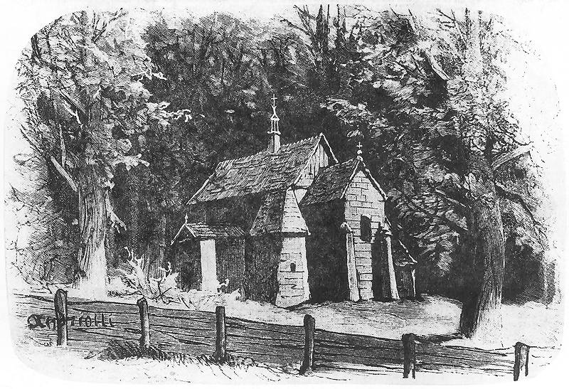 Michał Elwiro Andriolli